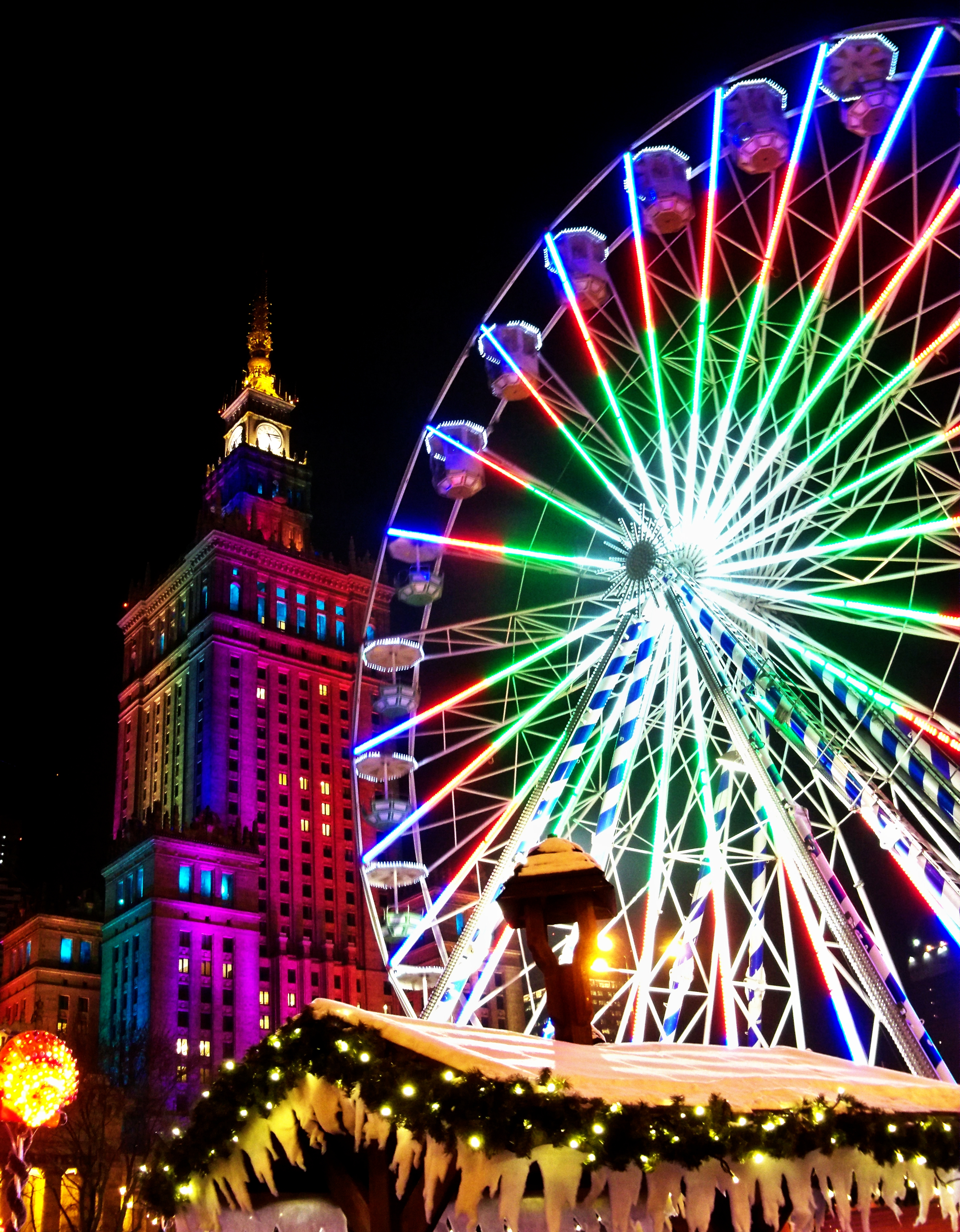 Jarmark świąteczny 2012 pod Pałacem Kultury i Nauki w Warszawie